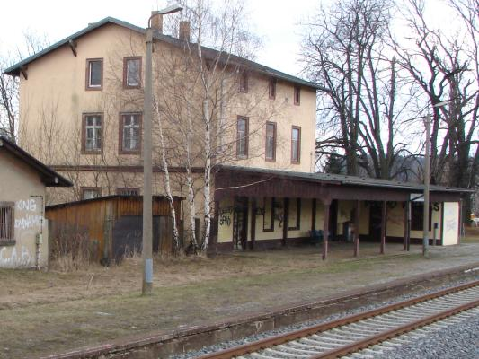 Bahnhof Schmölln selbst erstellt und auf veröffentlicht